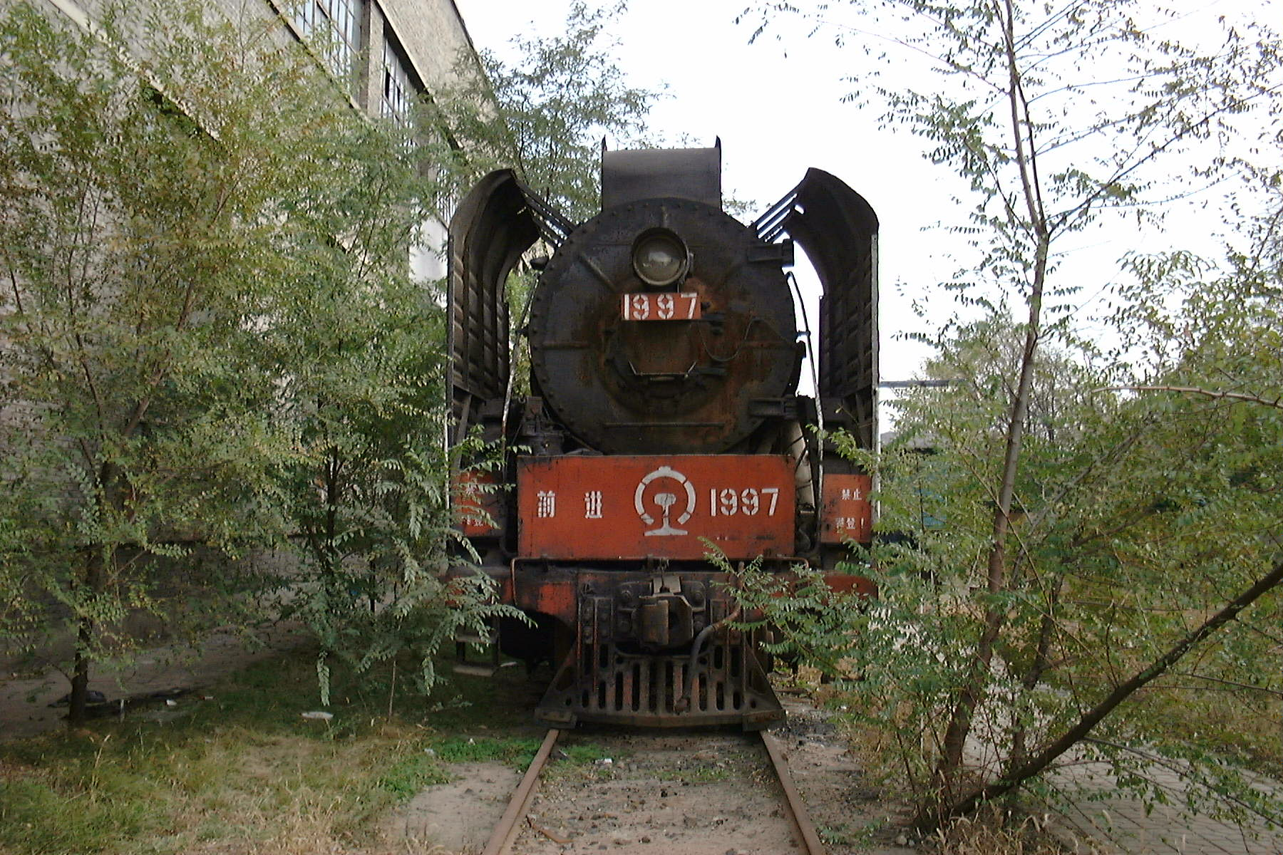 Datong railway museum